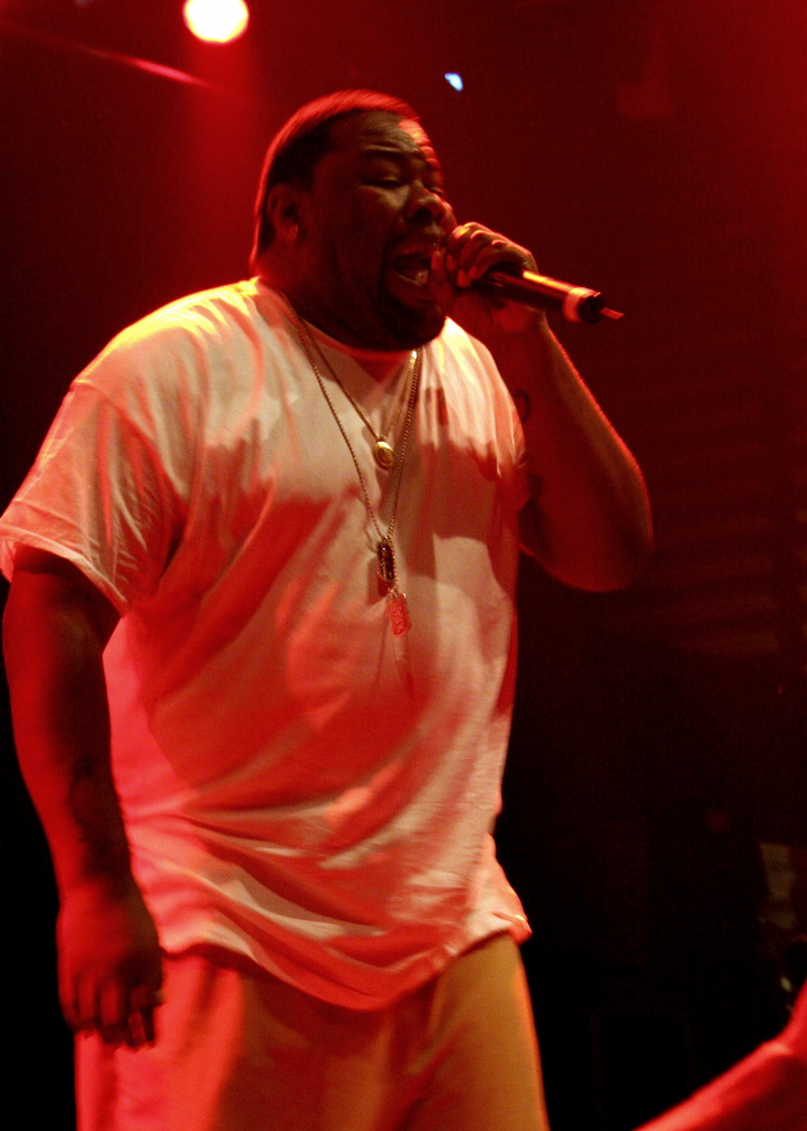 Biz Markie performing in Amager Bio, Denmark.